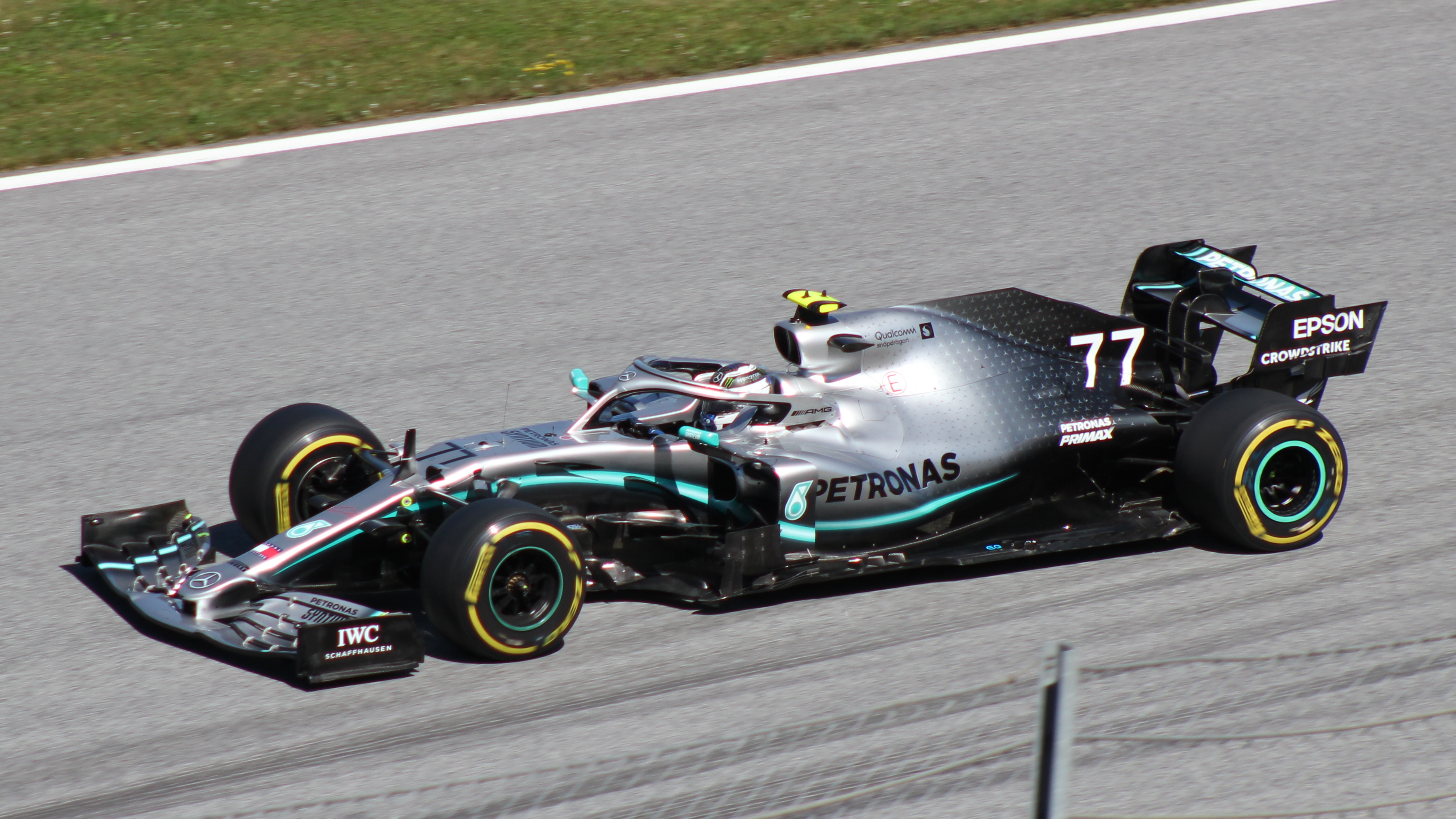 Bottas beim Rennwochenende in Österreich 2019